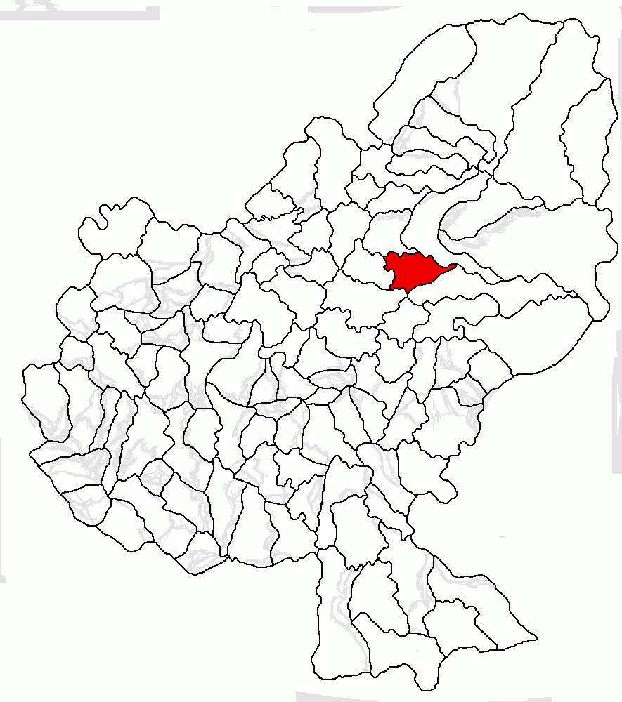 Categorie:Hărţi ale judeţului Mureş